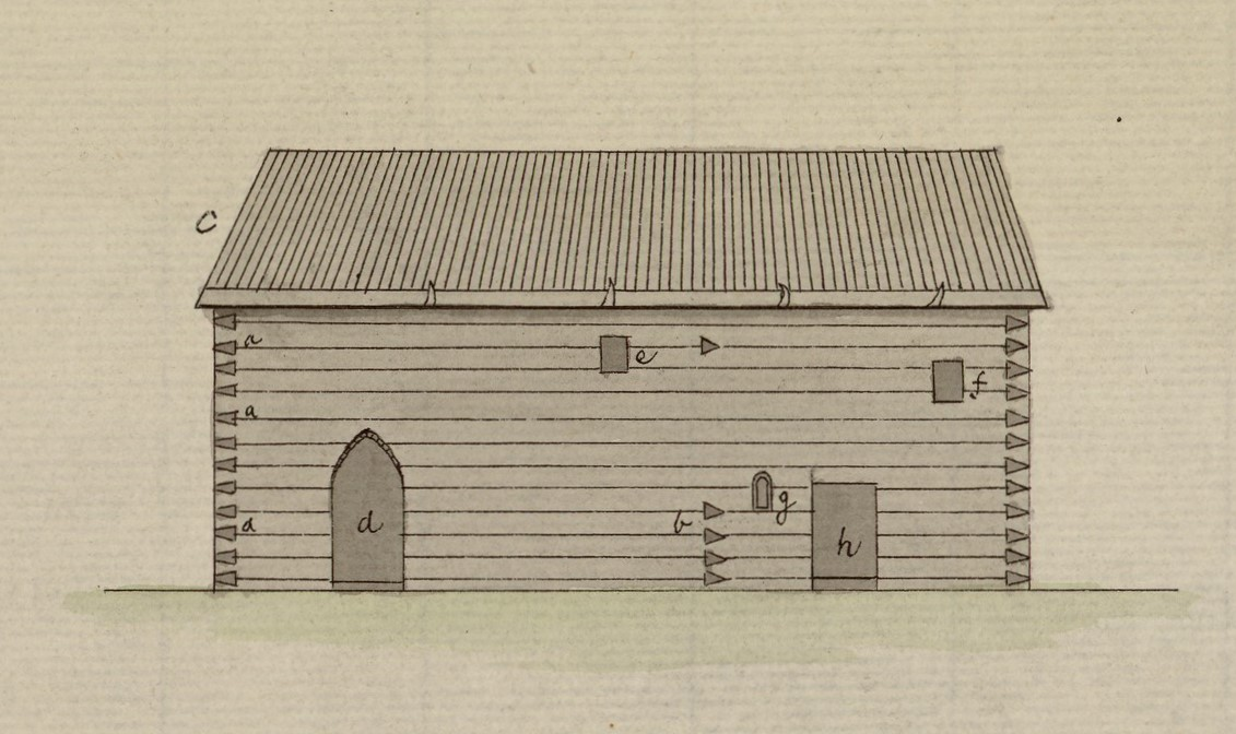 Fløan kirke i Stjørdalen i 1774, etter Gerhard Schønings skisse, kopiert av Henrik Mathiesen.